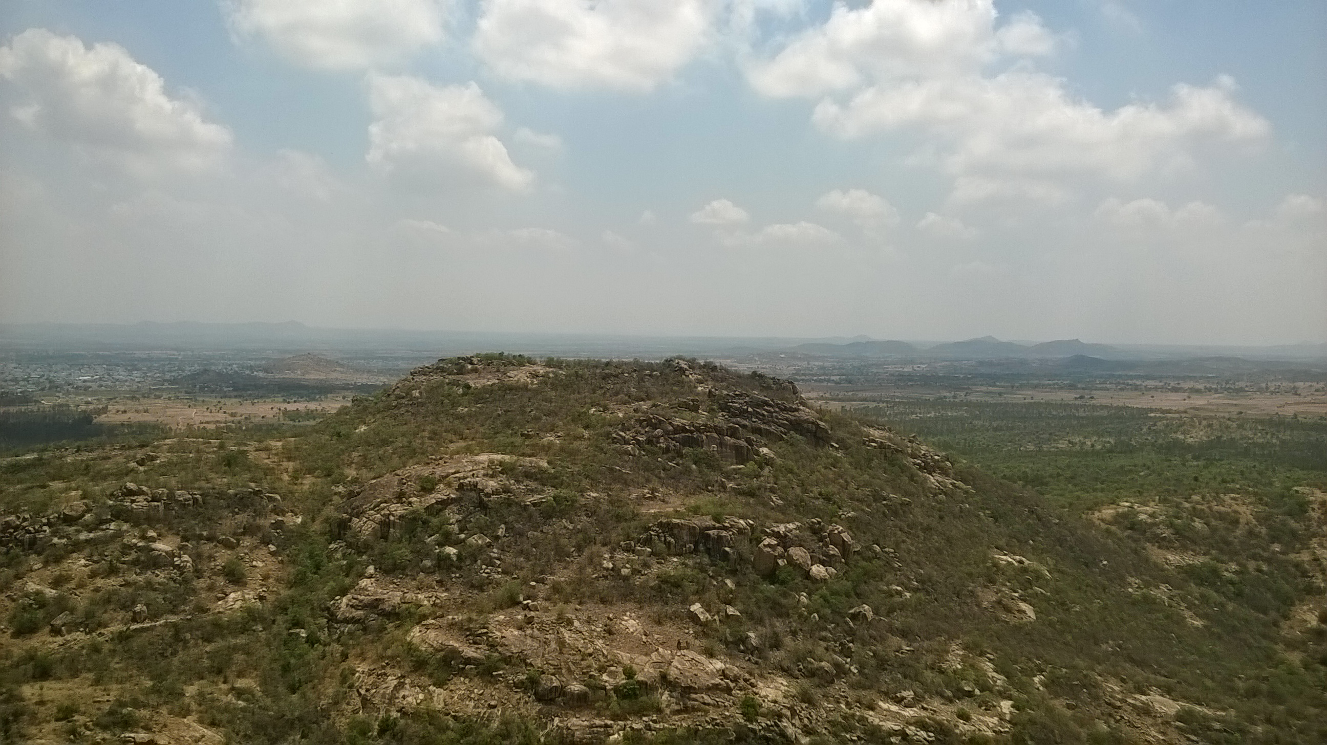 తిరుమల గుట్టల సౌందర్యం-1